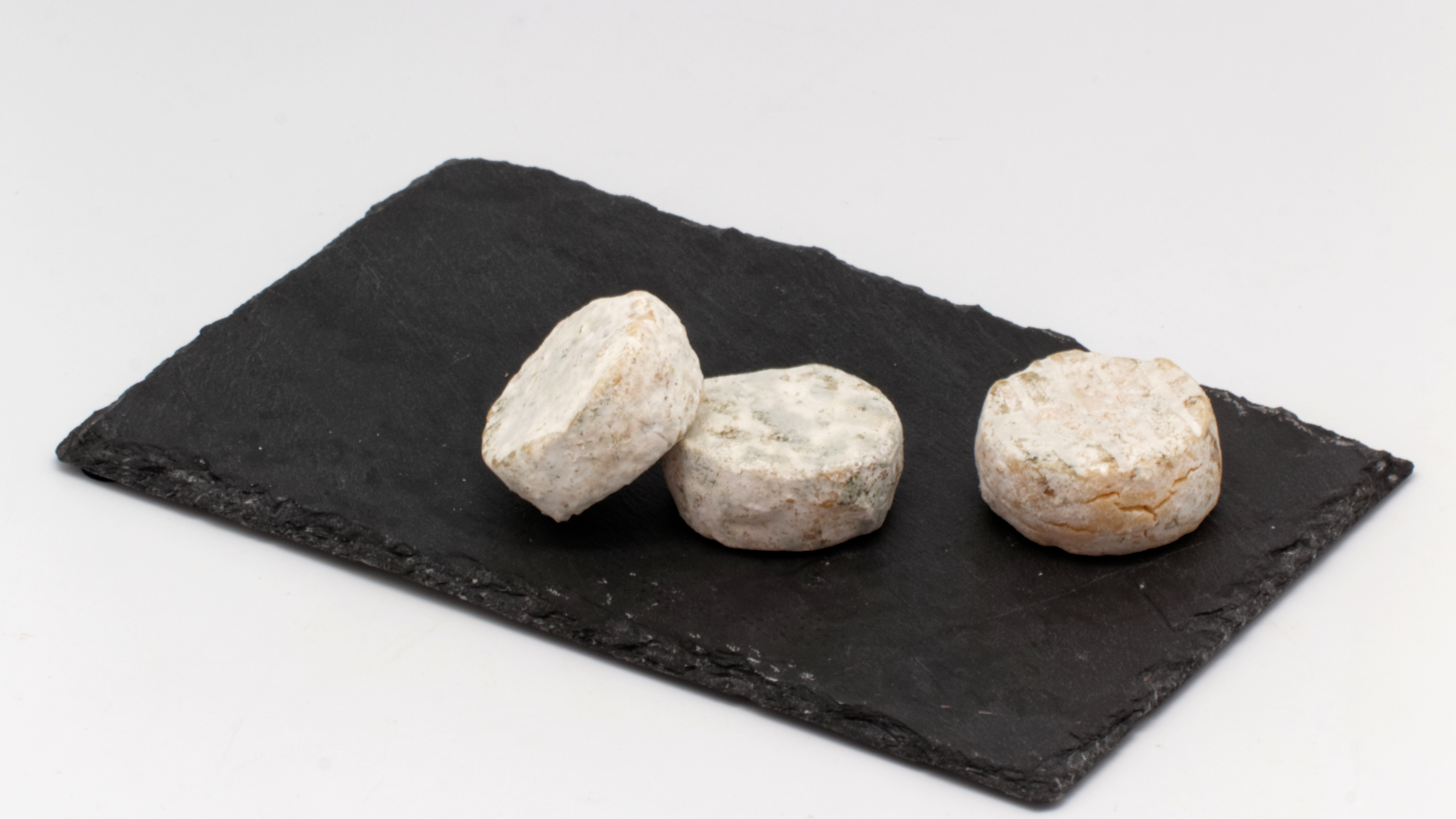 Rigotte de Condrieu ; Androuet 17e